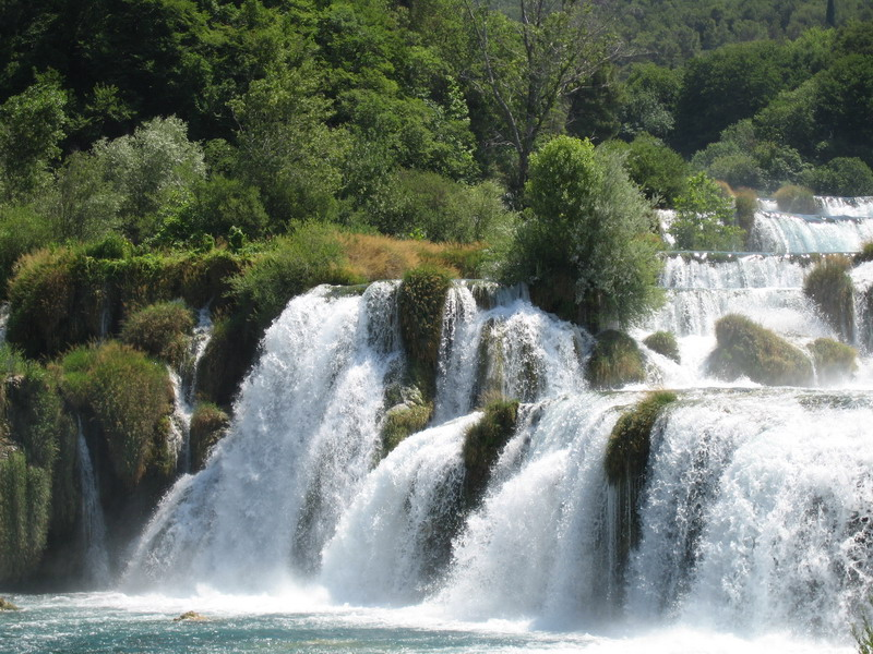 National park Krka